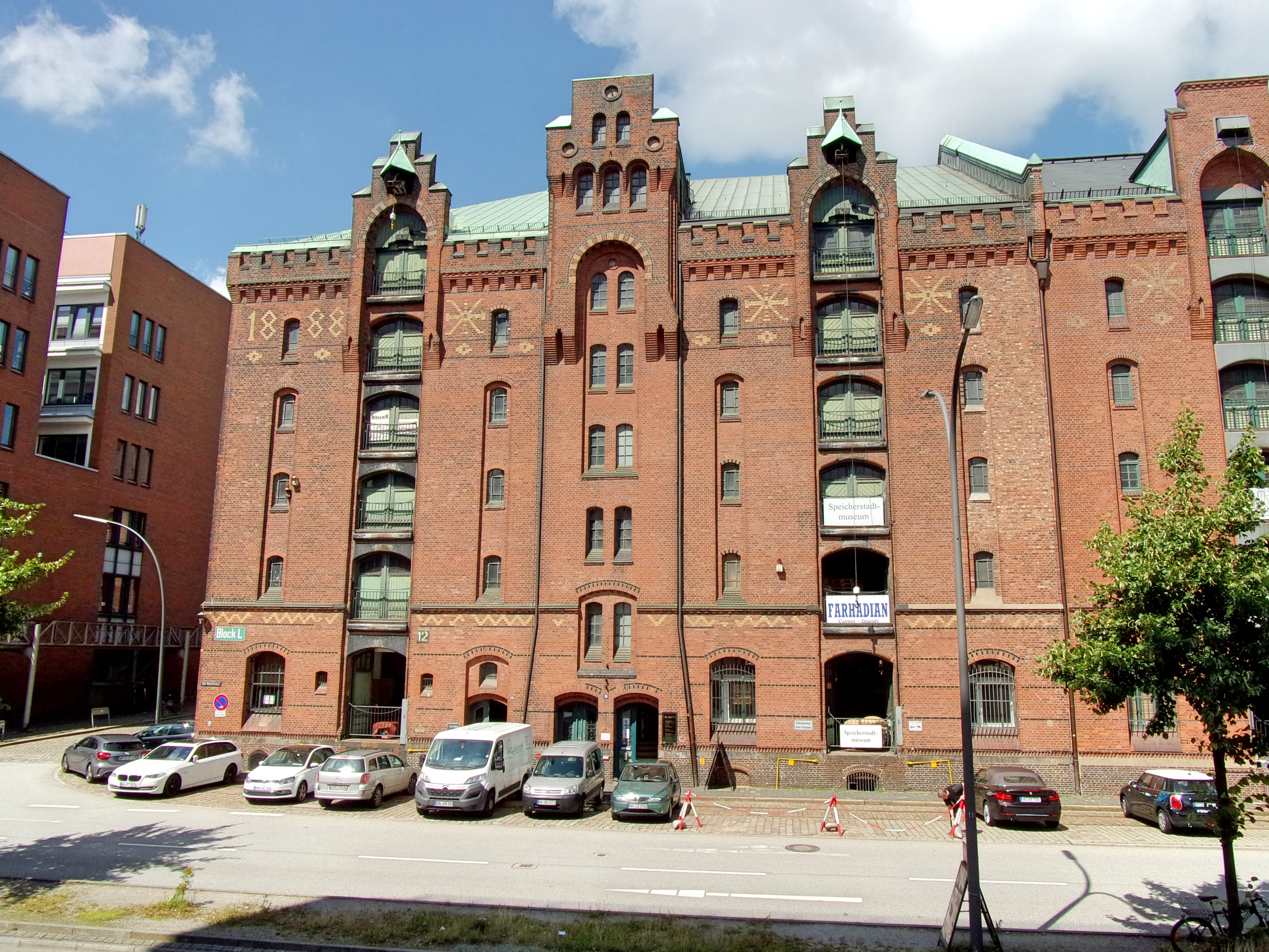 Am Sandtorkai 36, Block L der Speicherstadt beherbergt das Speicherstadtmuseum, eine Außenstelle des Museums der Arbeit. Das Gebäude wurde zwischen 1887-1888 erbaut, Ausführung Georg Thielen. This is a photograph of an architectural monument.